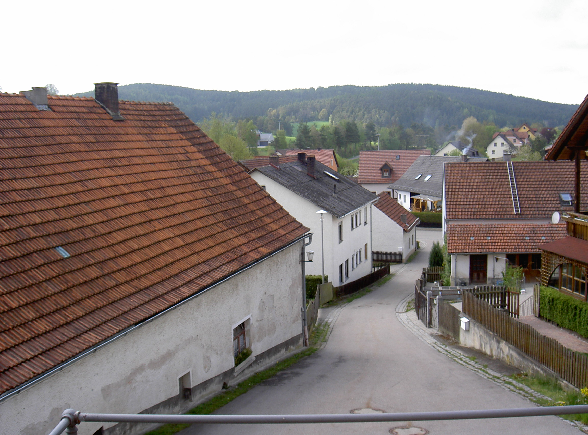 Blick vom Westportal der Nikolauskirche auf Unterauerbach